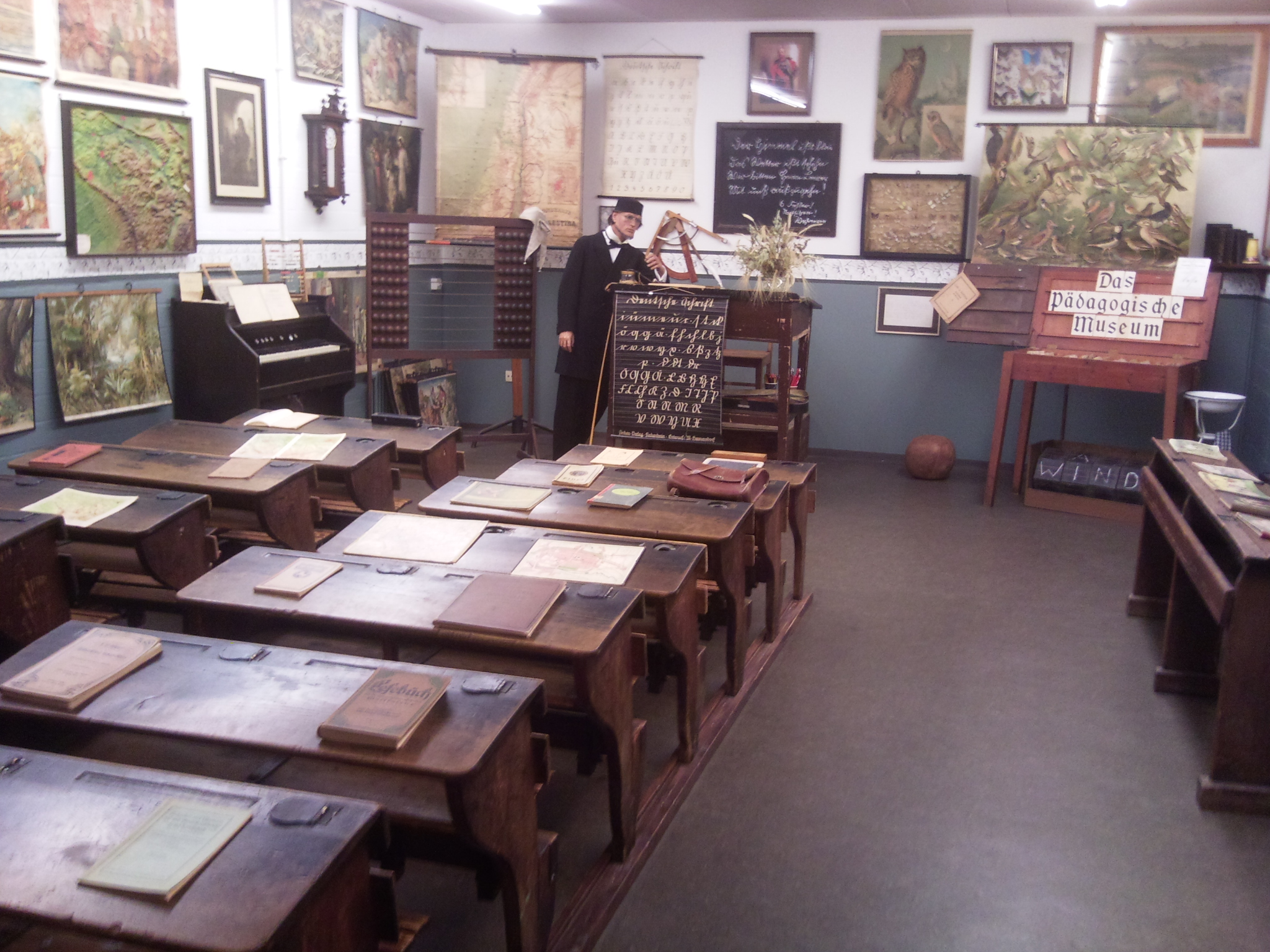 Pädagogisches Museum an der Uni Bielefeld